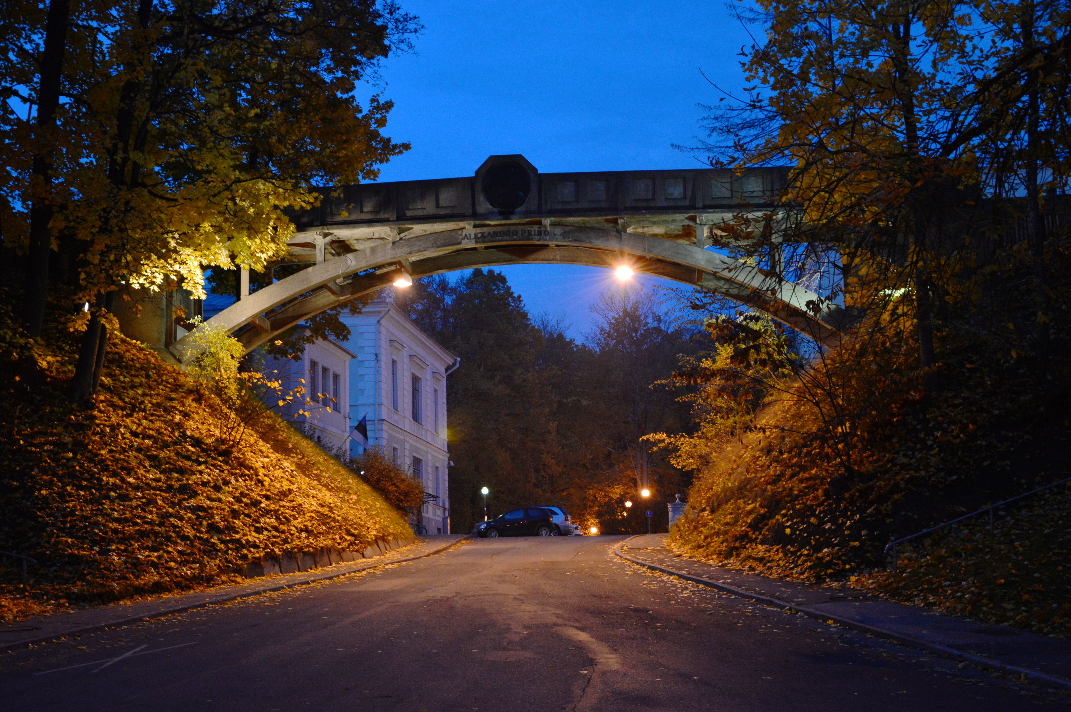 Kuradisild sügisõhtul